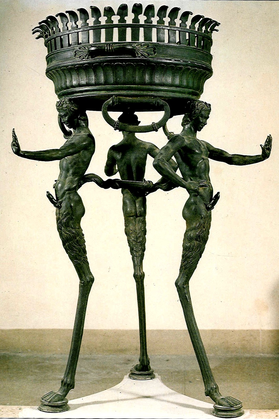 Tripode di bronzo con satiri itifallici, da Pompei (Praedia di Julia Felix), oggi nel Museo Archeologico di Napoli, sezione Gabinetto Segreto (inv. nr. 27874).